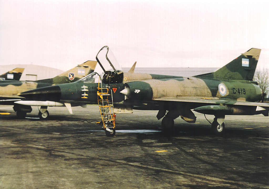 alistandose Mirage V Dagger (C-418)